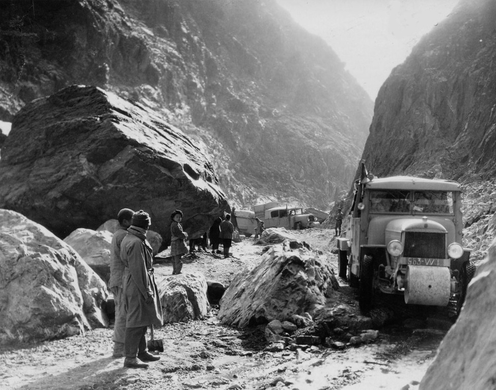 La traversée de la passe de Teksoun dans le Xinjiang en Chine par le groupe commandé par Victor Point. Expédition Centre-Asie Citroën, (1931 - 1932). Photographie publiée en octobre 1932 dans la revue mensuelle Le Monde colonial illustré, mais prise en 1931.